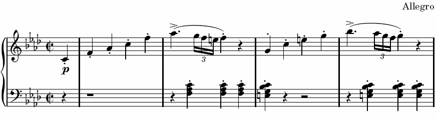 cinq premières mesures du premier mouvement de la Sonate pour piano n° 1 de Beethoven